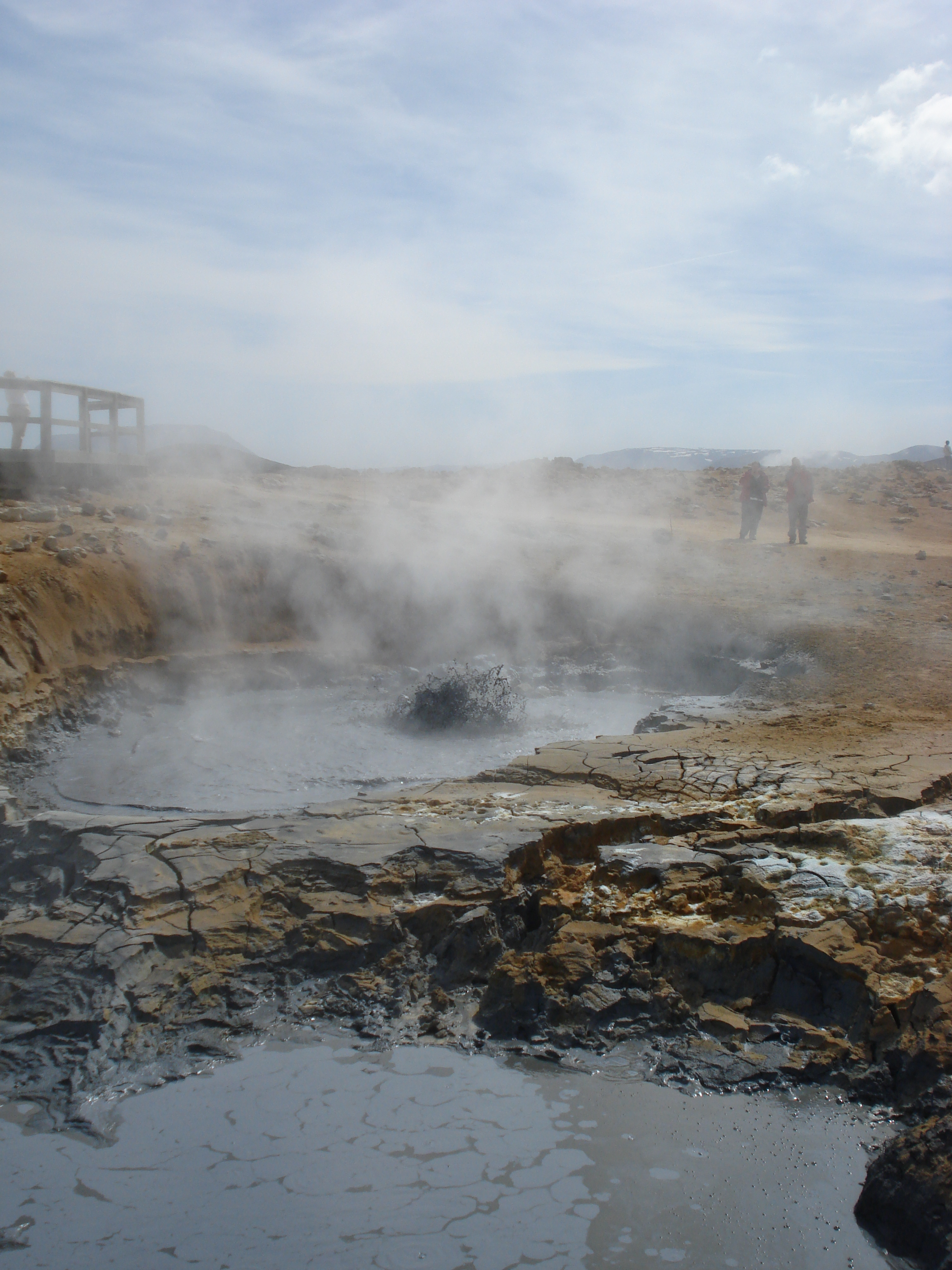 Námafell, Iceland